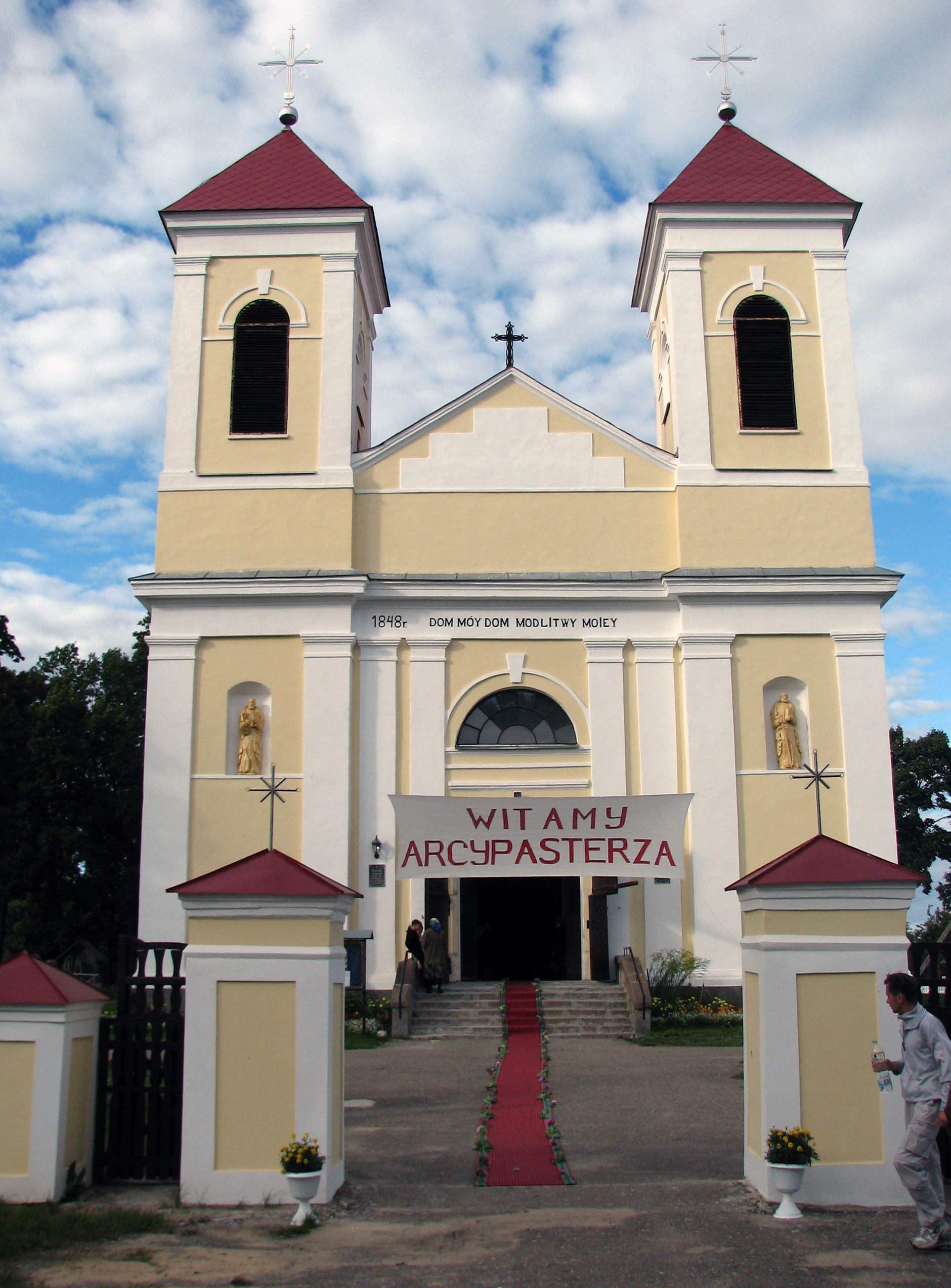 Беларуская (тарашкевіца): Касьцёл Найсьв. Тройцы ў Шарашове перад прыездам Казімера Сьвёнтка